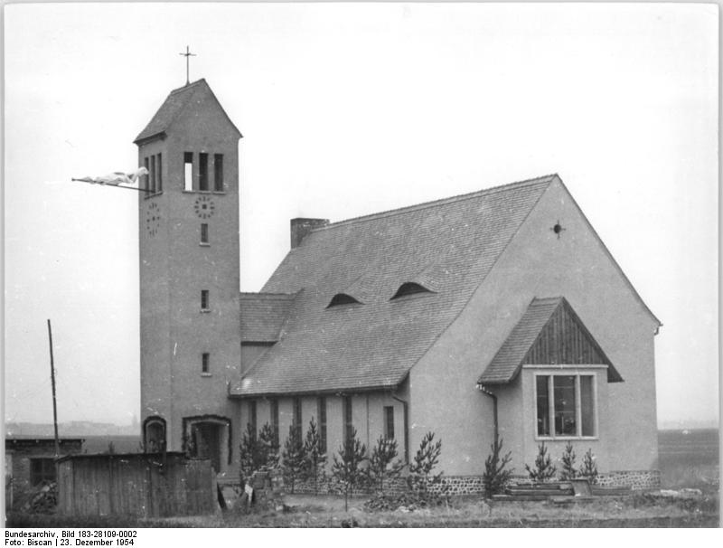 Zentralbild-Biscan Wjt-Qu 2 Mot. 23.12.1954 Kirchenweihe in Magdeburg-Nordwest Die zweite nach 1900 in Magdeburg erbaute evangelische Kirche, die Kreuzkirche in Magdeburg-Nordwest wurde jetzt geweiht. Der Kirchenneubau wurde 1953-1954 nach einem Entwurf des Kirchen-Oberbaurates Seebach ausgeführt und bietet 260 Gläubigen Platz. UBz Blick auf die neuerbaute Kreuz-Kirche am nordwestlichen Stadtrand Magdeburgs.